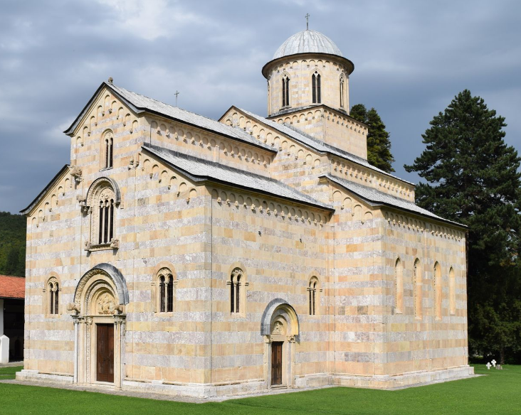 Klášter Visoki Dečani na západě Kosova